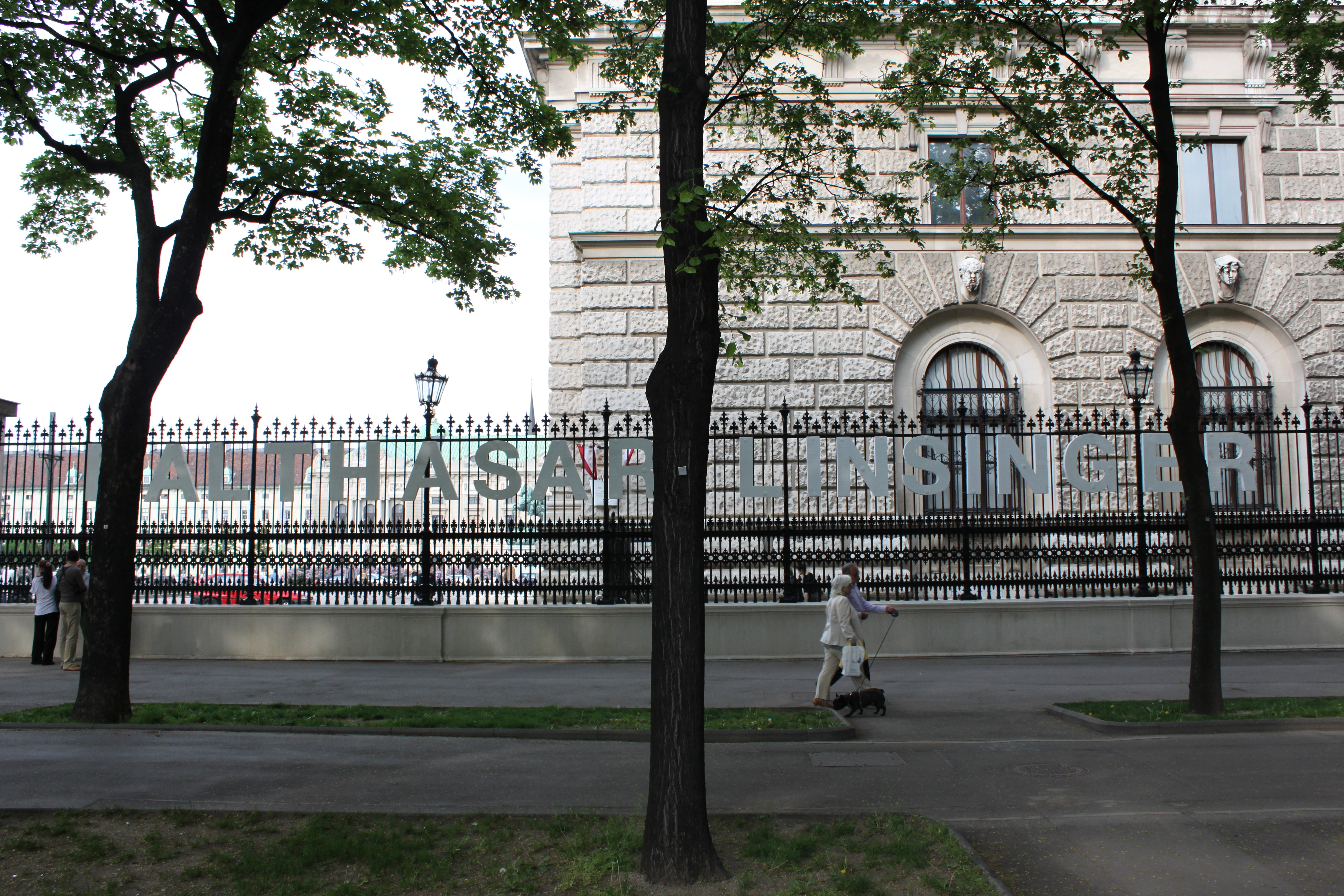 Aktion von in Wien, von der Oper bis zum Burgtheater, April bis Mai 2011